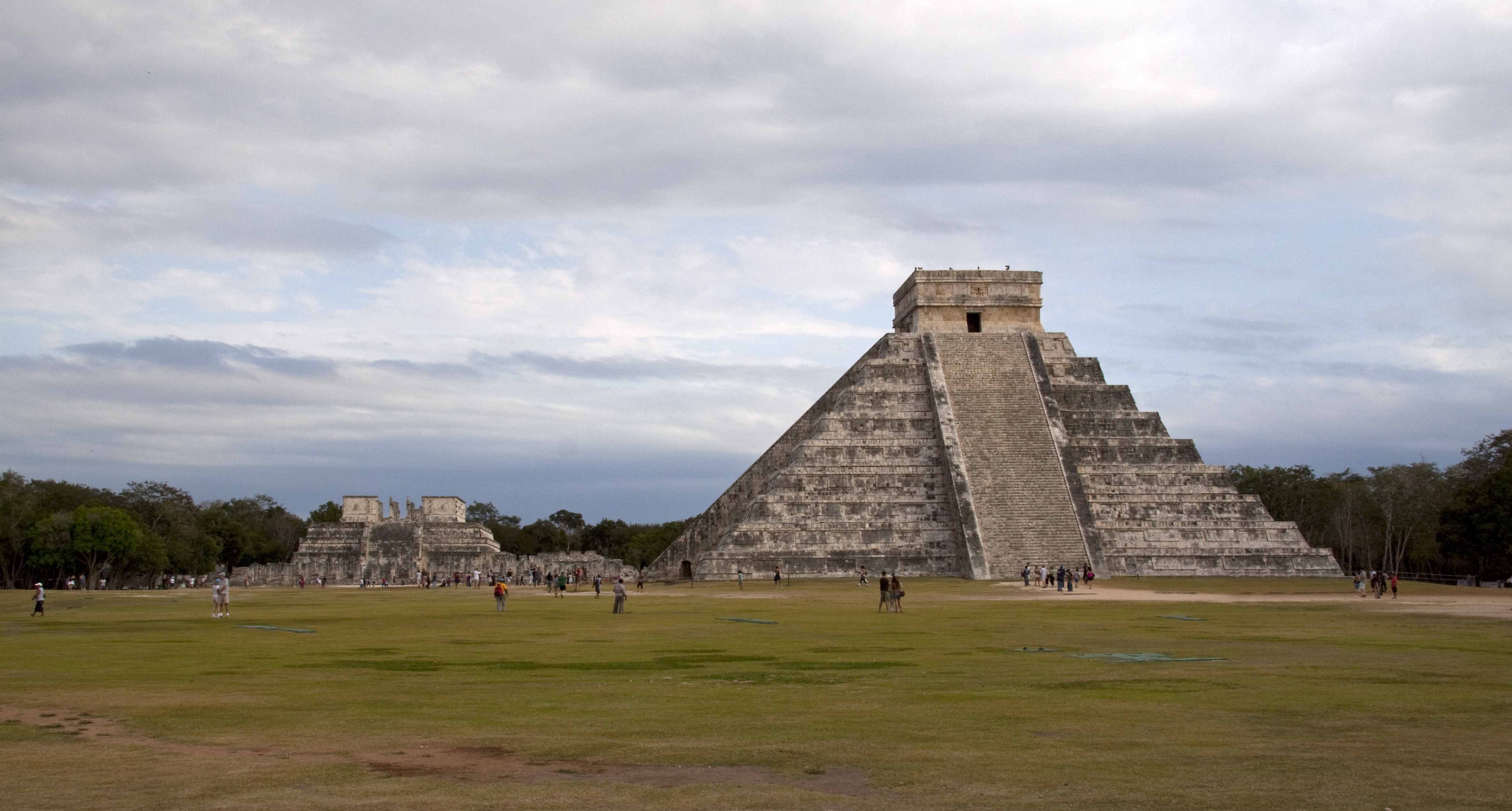 Chichen Itza